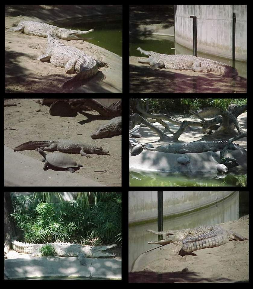 Reptiles del Parque Generalisimo Francisco de Miranda Caracas - Venezuela